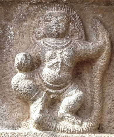 தஞ்சாவூர் பெரிய கோவிலில் உள்ள காளிங்க நர்த்தனத்தை குறிக்கும் புடைப்புச் சிற்பம்.